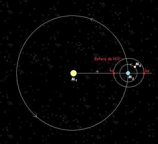 ESFERA DE ROCHE O DE HILL. Se tienen dos cuerpos masivos uno mayor (M1) y otro menor (M2) orbitando. La Esfera de Roche o de Hill es una esfera gravitacional alrededor de M2 en donde ocurre la atracción de cuerpos menores (M3) para luego quedar en órbita del M2, es decir ser satélites. El cuerpo menor M2 tiene una esfera gravitacional que tiene como diámetro (eje elipsoide) desde el punto de Lagrange 1 (L1) hasta el punto de Lagrange 2 (L2). Es allí, entonces, donde un tercer cuerpo (M3) atraído por M2 puede quedar orbitando como satélite. Por ejemplo, la Luna se encuentra dentro de la esfera de Hill terrestre que tiene un radio (centro la Tierra) de 1,5 millones de kilómetros. Por ende, todo cuerpo masivo o no en el espacio tendrá su esfera de Hill, ej. estrellas, planetas, satélites, asteroides y cometas. Fuente Wikipedia